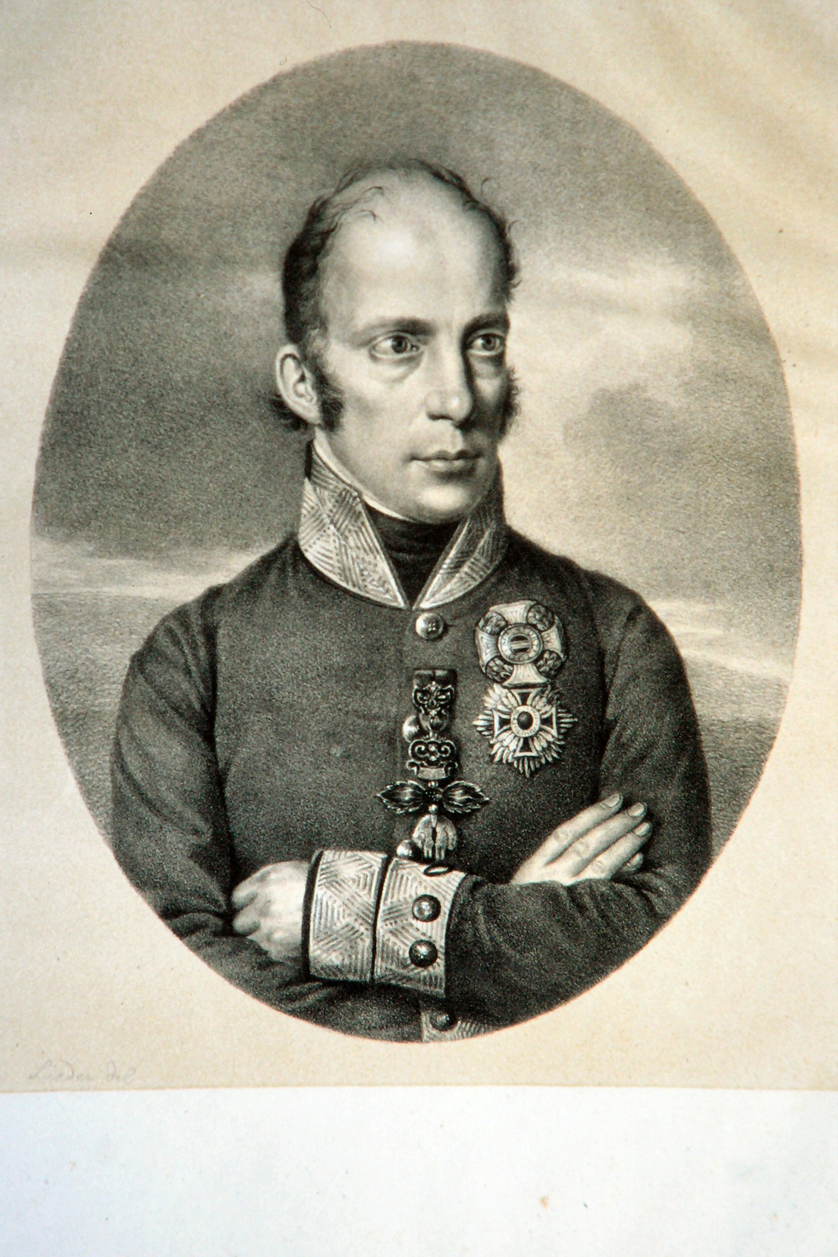 Johann von Österreich (1782-1859), ERzherzog, Reichsverweser